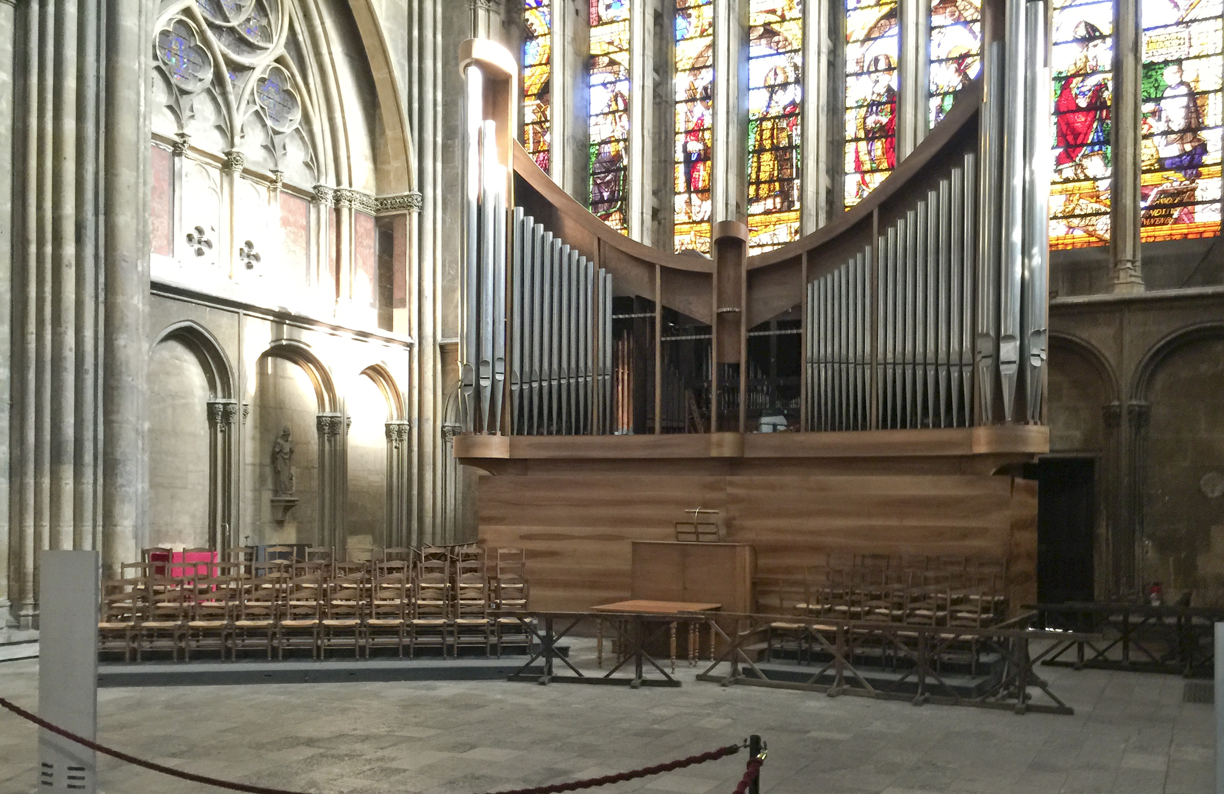 Photographie de l'orgue de la cathédrale Saint-Etienne